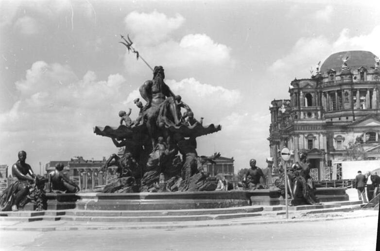 Illus-Rudolph-Kno-Be.22.5.1951 Der Neptunsbrunnen in Berlin, Marx-Engels-Platz.UBz: Gesamtansicht